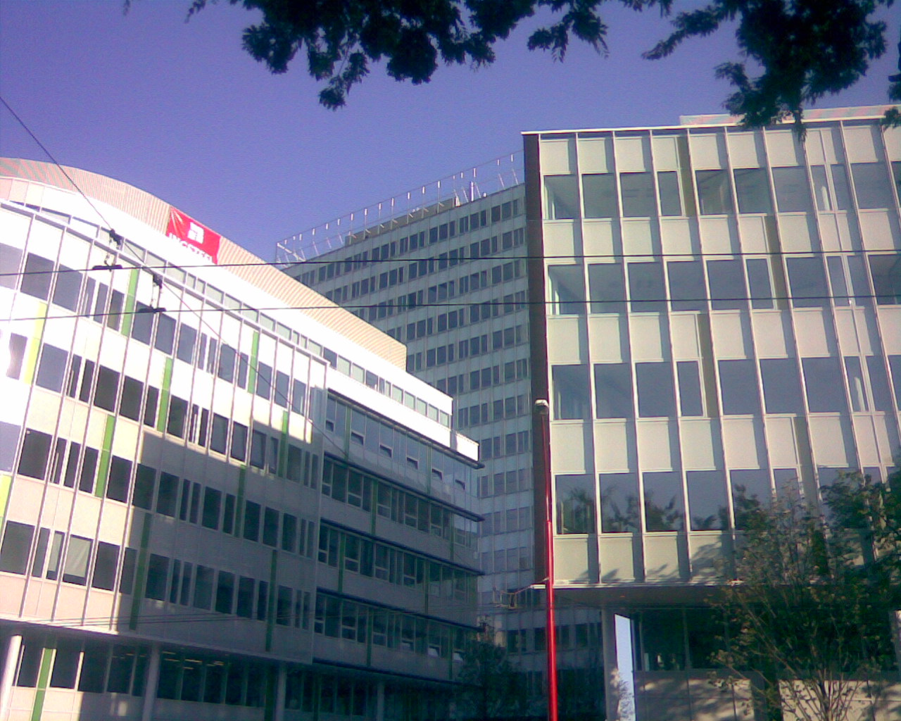 Apollo_Business_Center_II